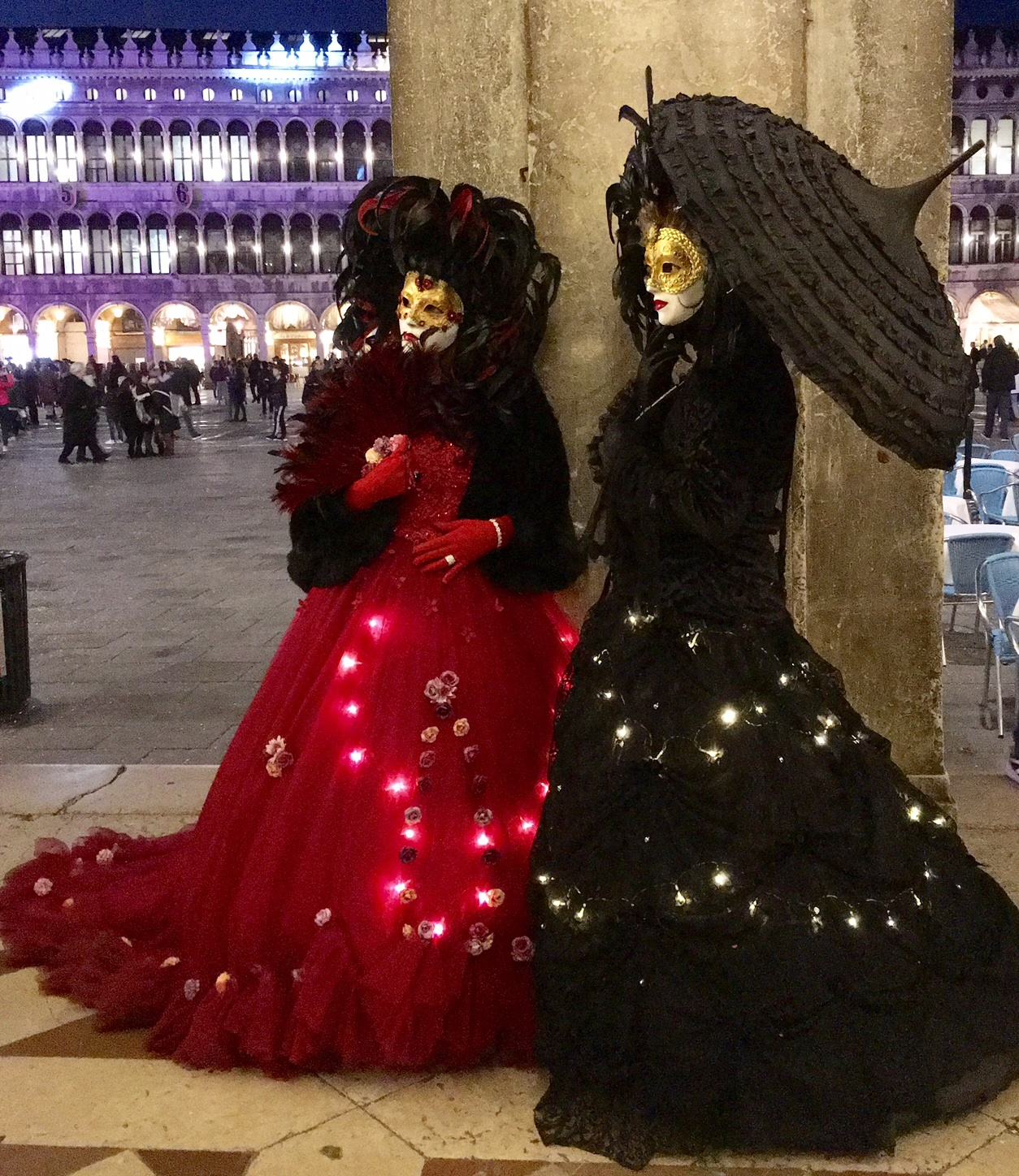 Karneval in Venedig 2019, Markusplatz, Venedig, Italien, Europäische Union